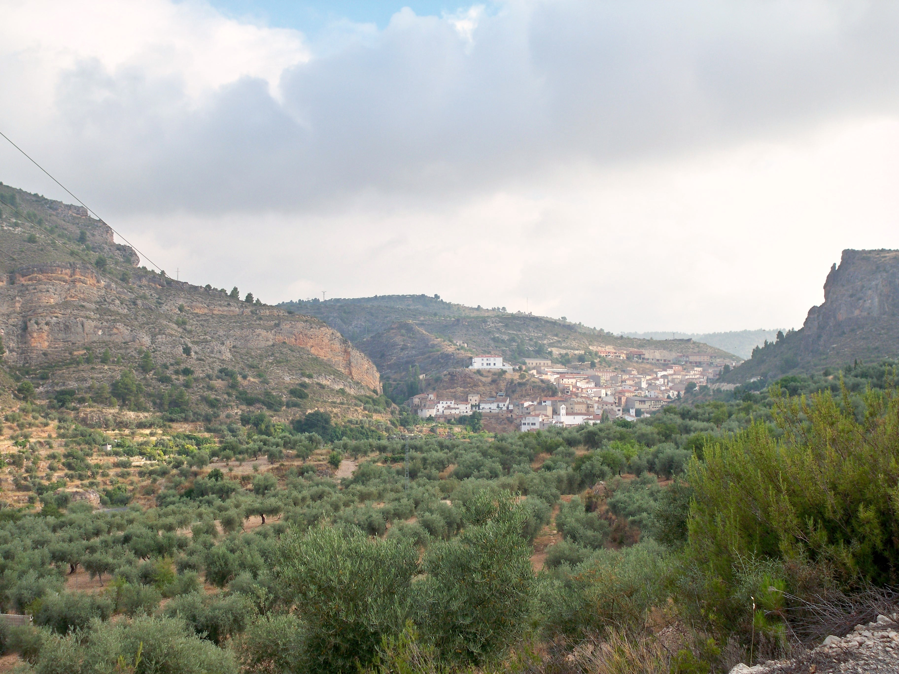 Vista de la localidad de Molinicos (Albacete) bañada en un mar de olivos.